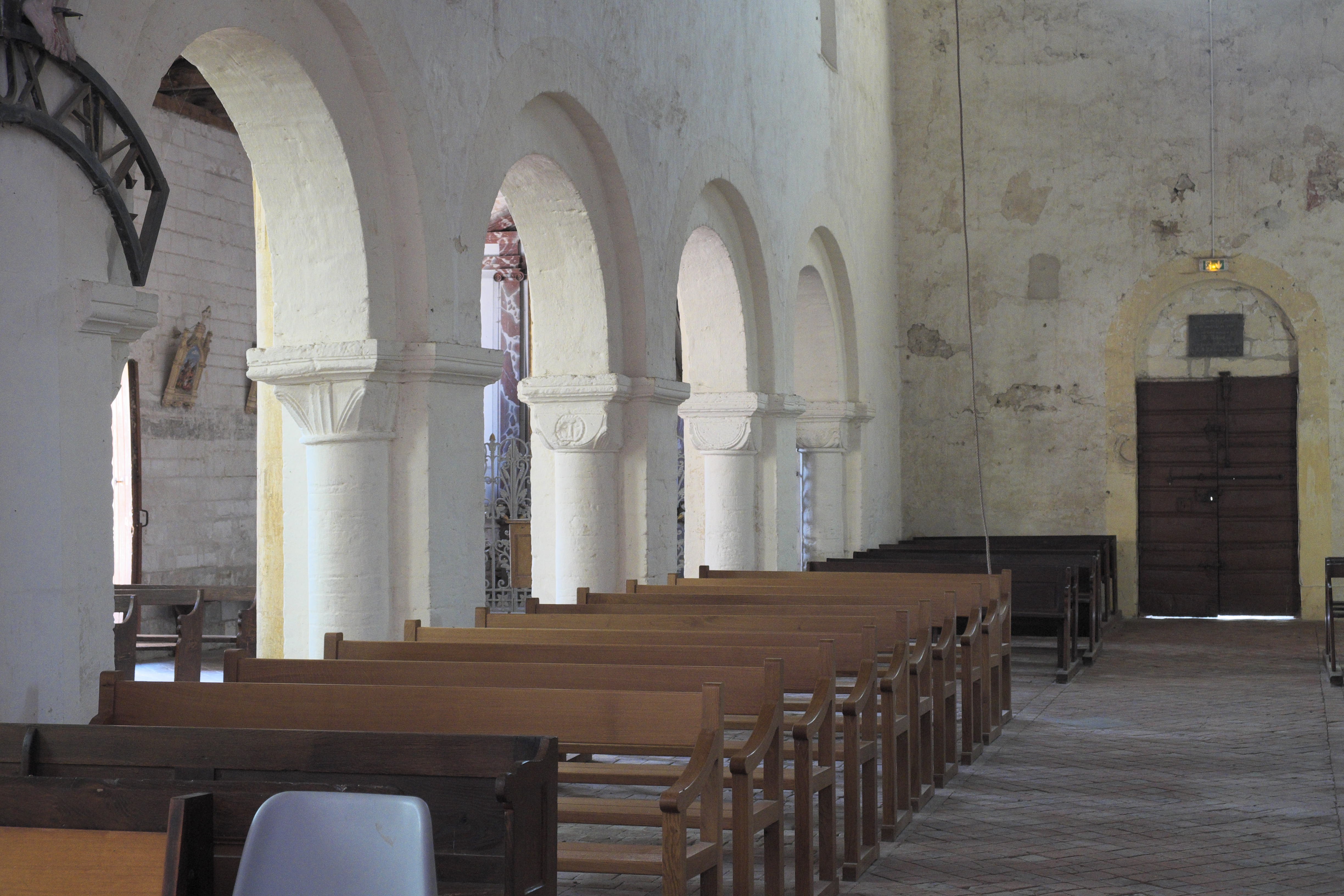 Katholische Kirche Saint-Symphorien in Ponthion im Département Marne in der Region Grand Est/Frankreich, Innenraum